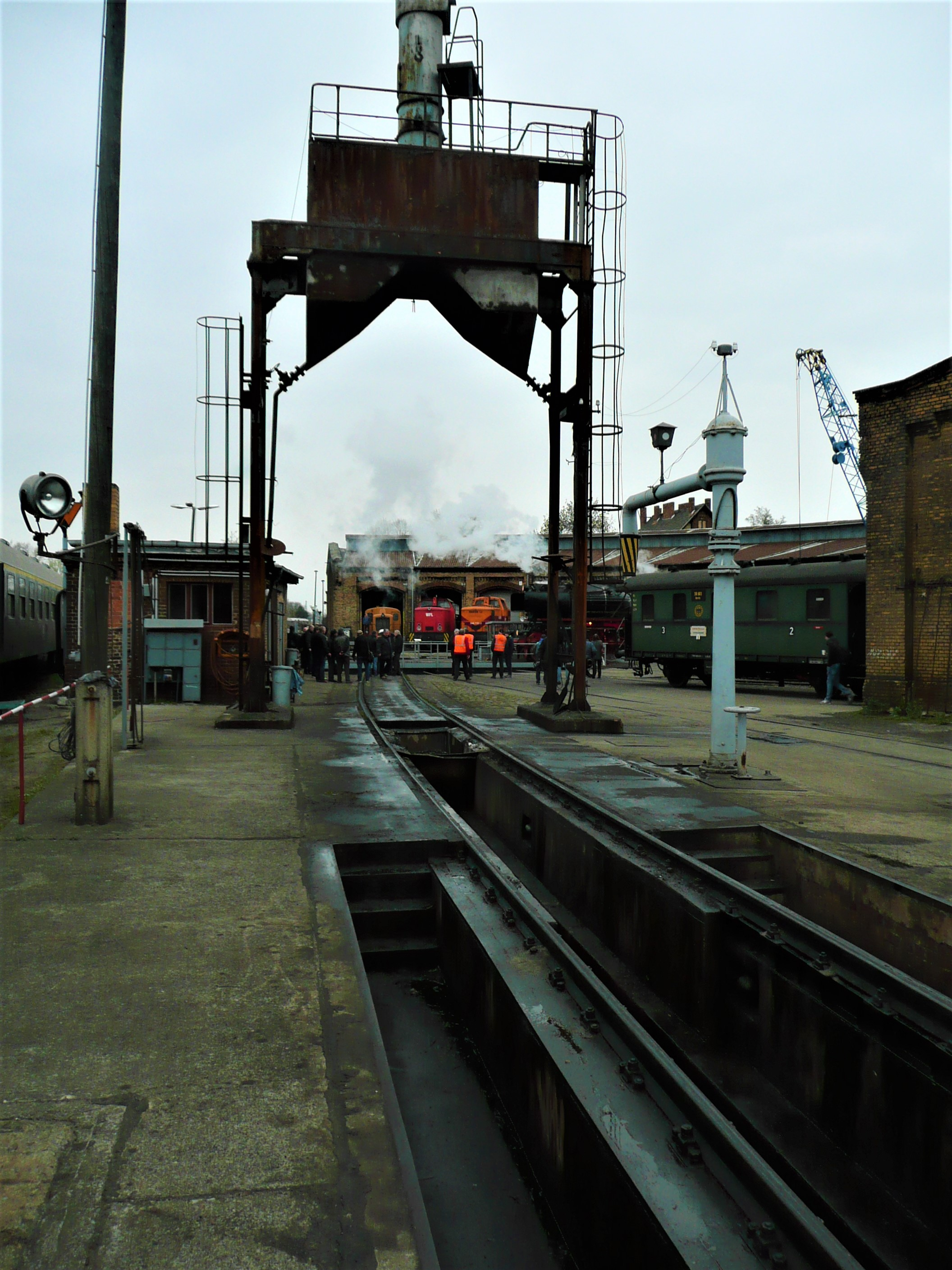 Besandungsanlage im Depot Berlin-Schöneweide